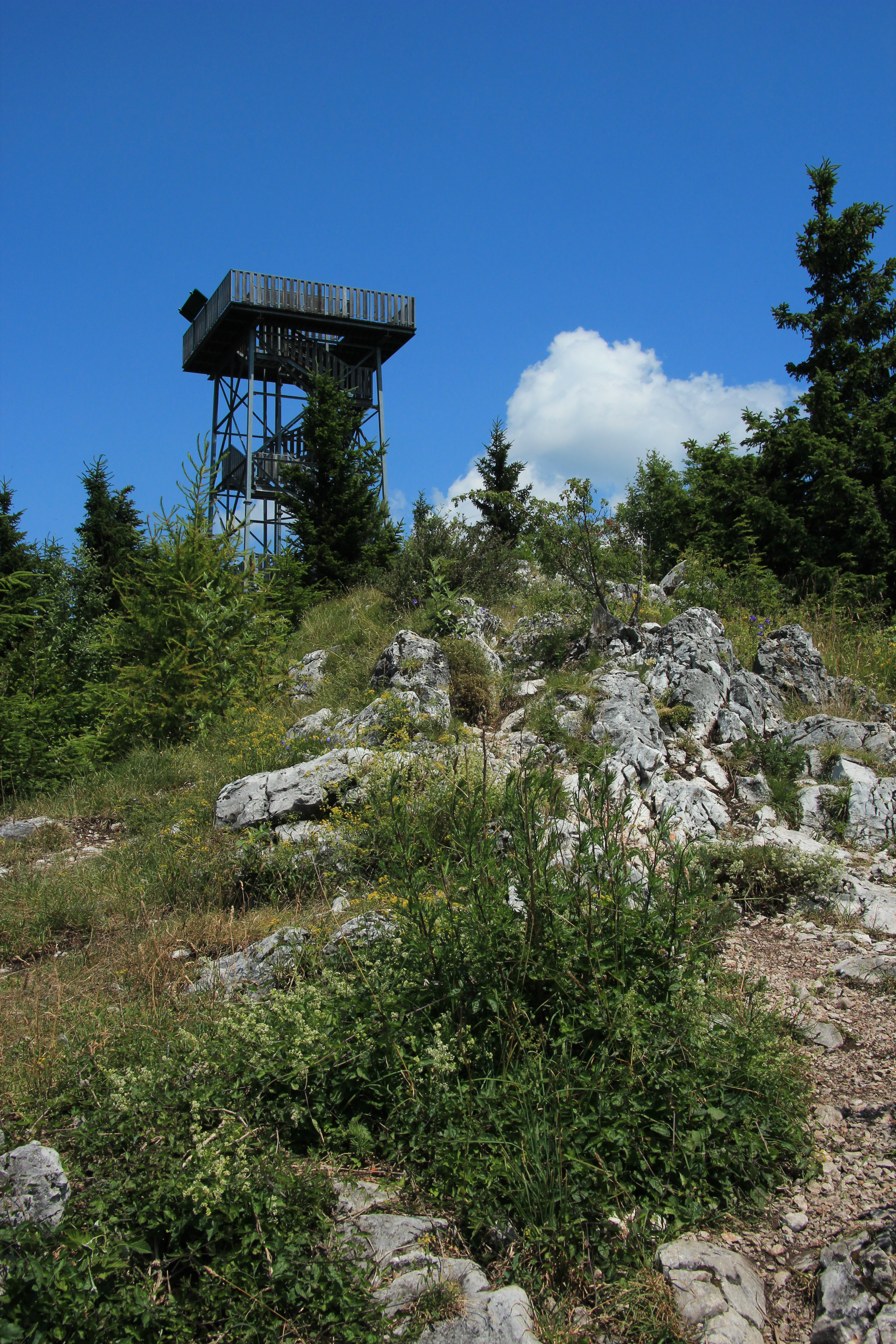 Naturpark Hohe Wand, Niederösterreich: Blick zum Aussichtsturm